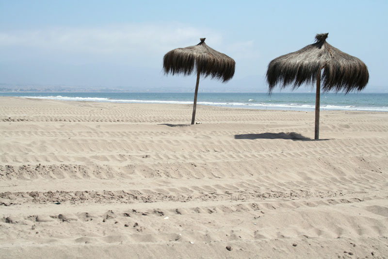 Beach in La Serena, Chile